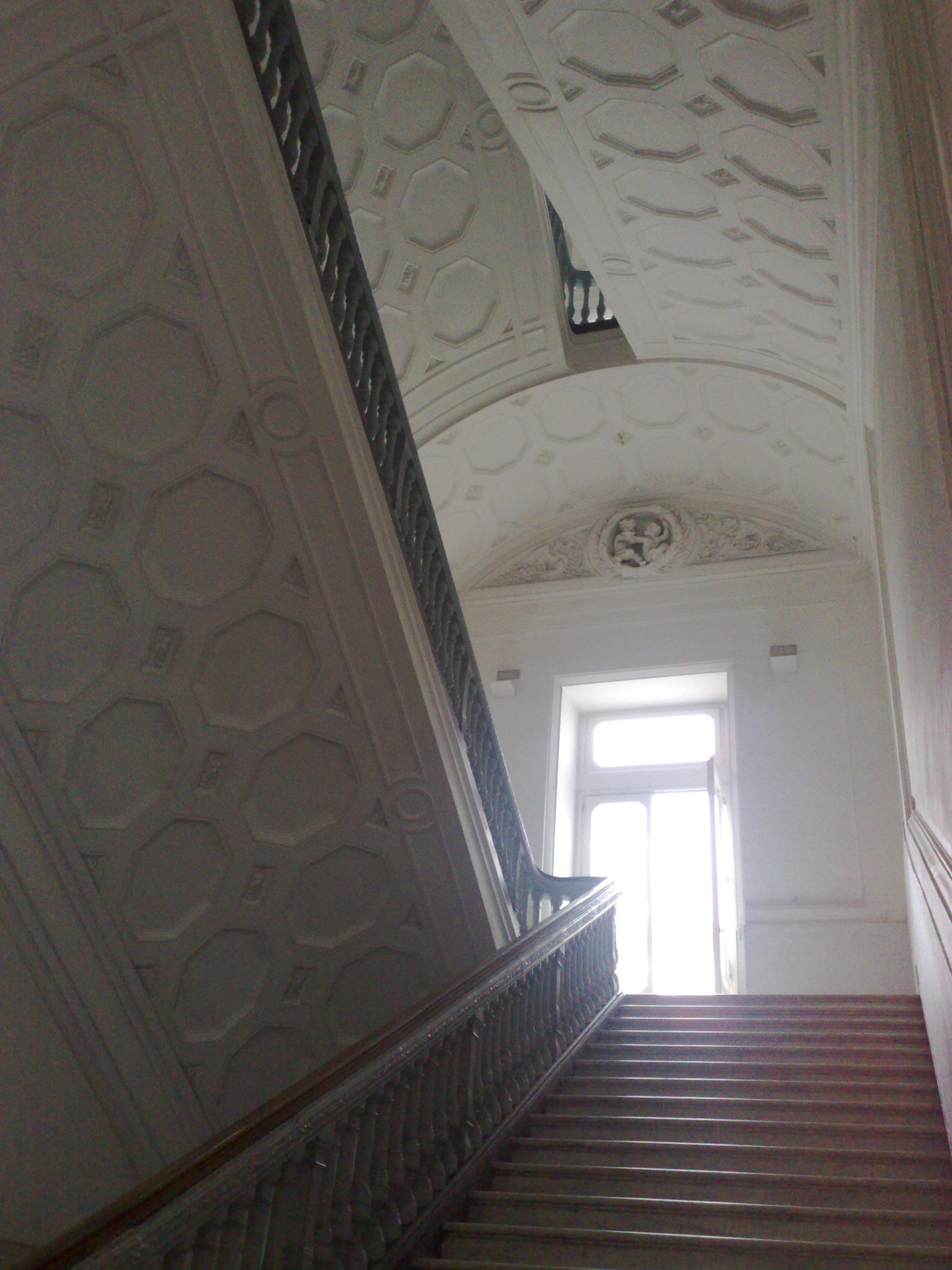 Interno dell'università Federico II di Napoli. Facoltà di giurisprudenza.